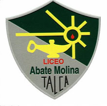 school